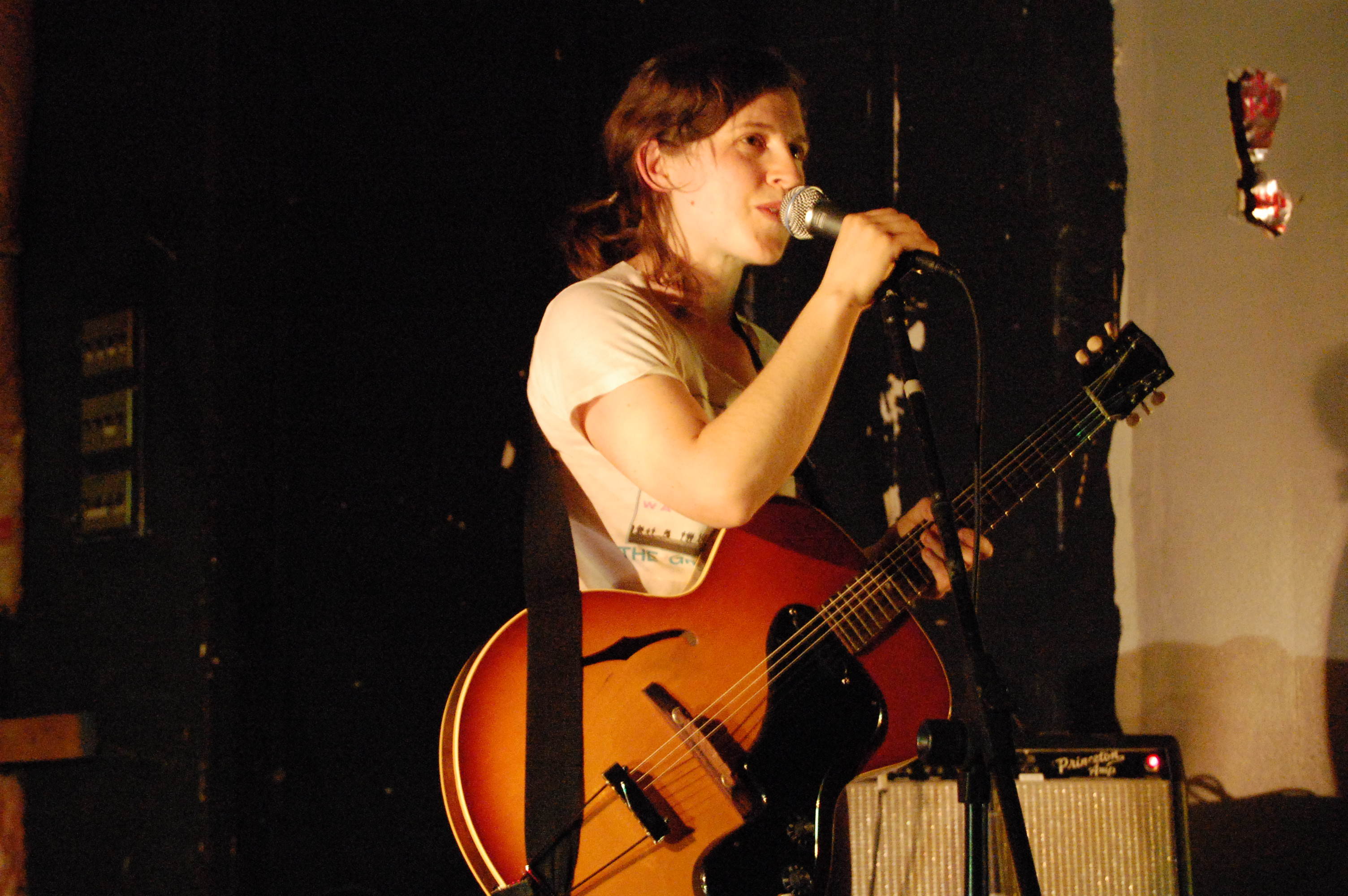 Mirah